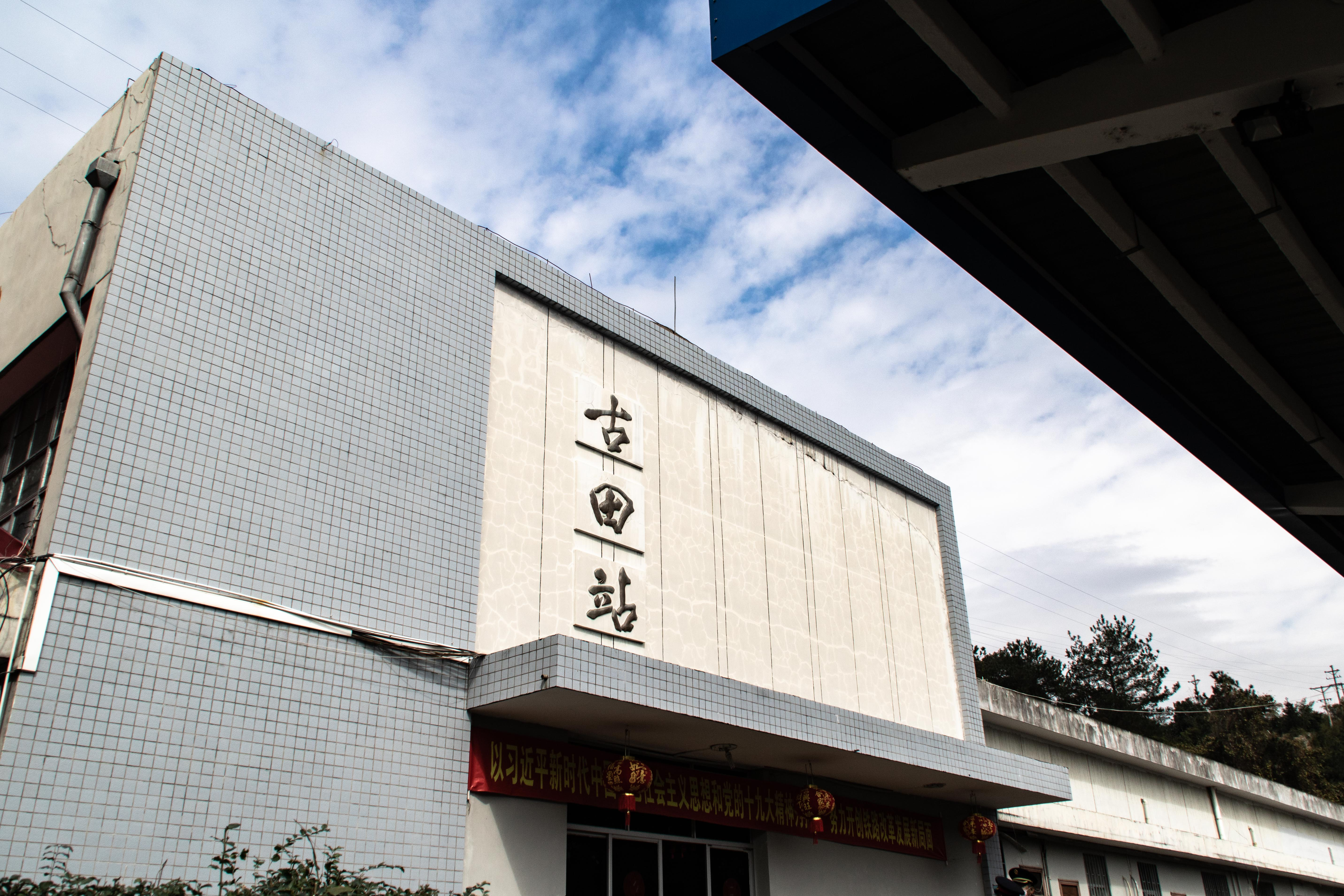 中文（中国大陆）: 古田站站房